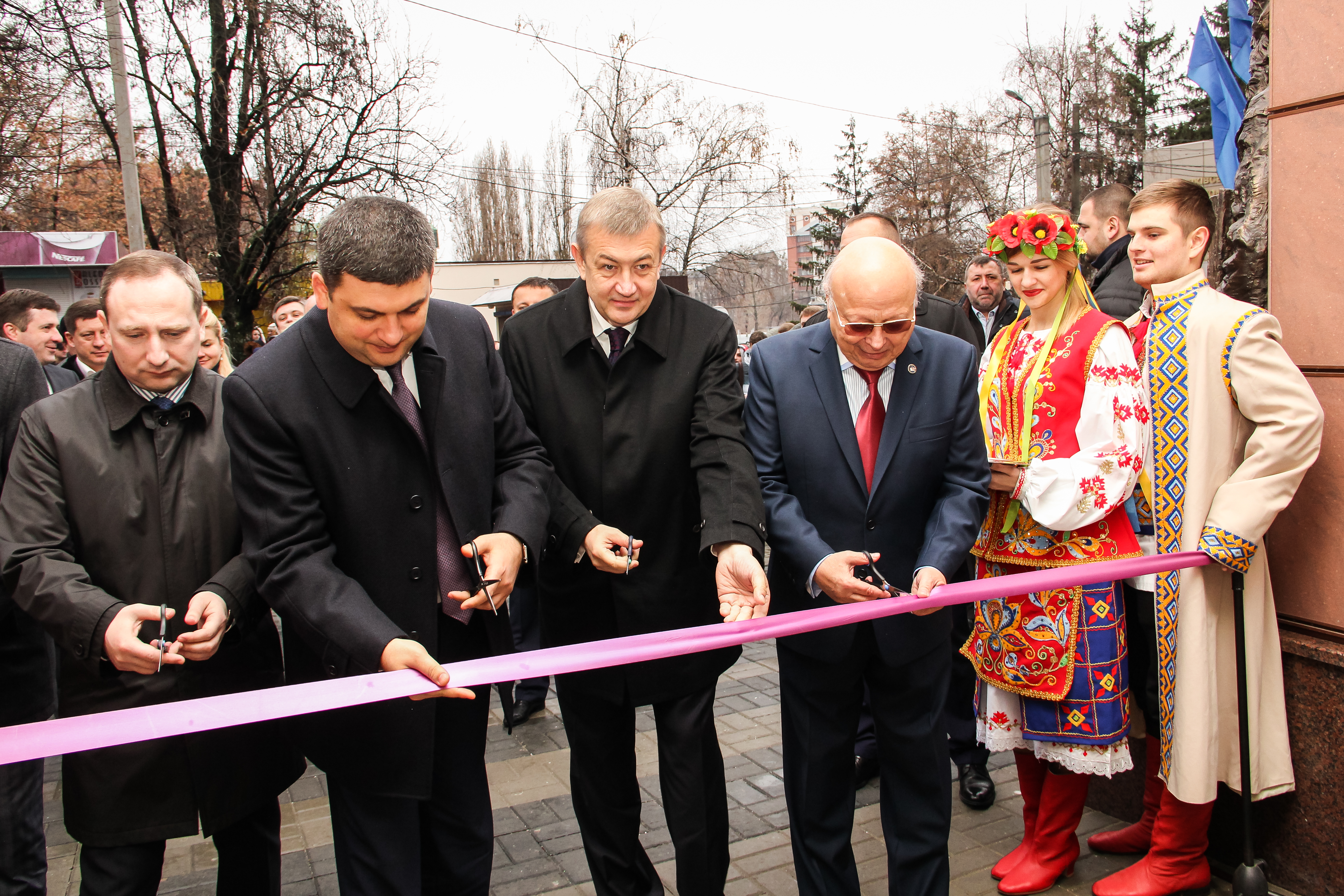 Церемонія відкриття нового Аудиторного корпусу Харківського національного економічного університету імені Семена Кузнеця з нагоди 85-річчя з дня засування університету. 30 листопада 2015 року. На фото (зліва направо): Голова Харківського обласної державної адміністрації Ігор Райнін, Голова Верховної Ради України Володимир Гройсман, Голова Харківської обласної ради Сергій Чернов, Ректор Харківського національного економічного університету імені Семена Кузнеця Володимир Пономаренко.